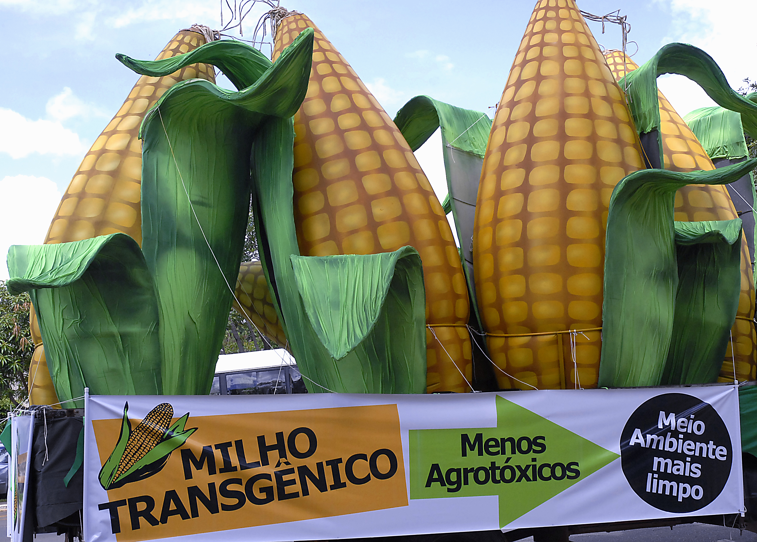 Brasília - Milho transgênico é defendido próximo ao Interlegis, onde a Comissão Técnica Nacional de Biossegurança (CTNBio) promove debate sobre o produto geneticamente modificado